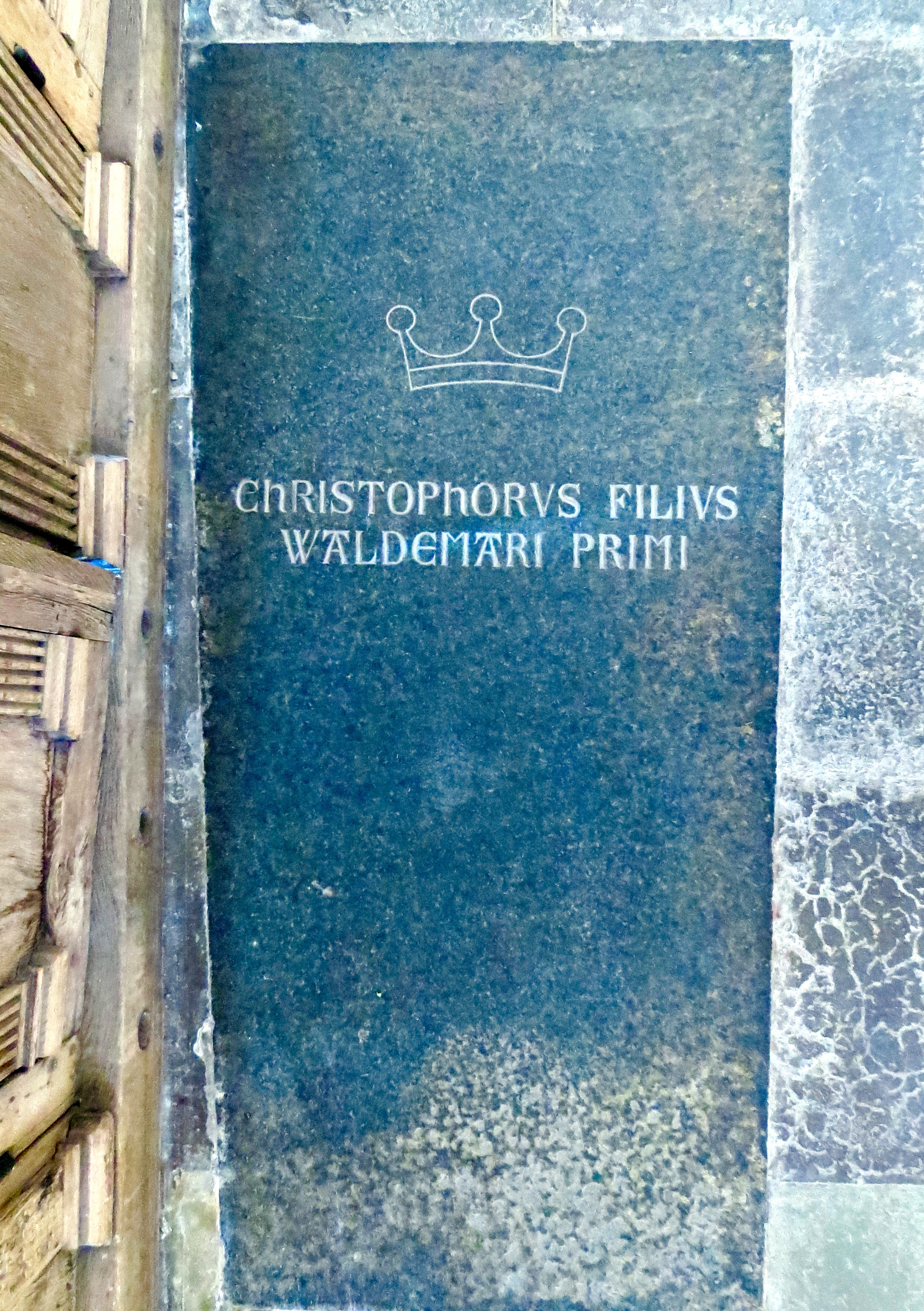 «CHRISTOPHVS FILIVS WALDEMARI PRIMI». Gravminde over Christoffer af Slesvig, Valdemar den Stores søn med Tove. Skt. Bendts Kirke, Ringsted.